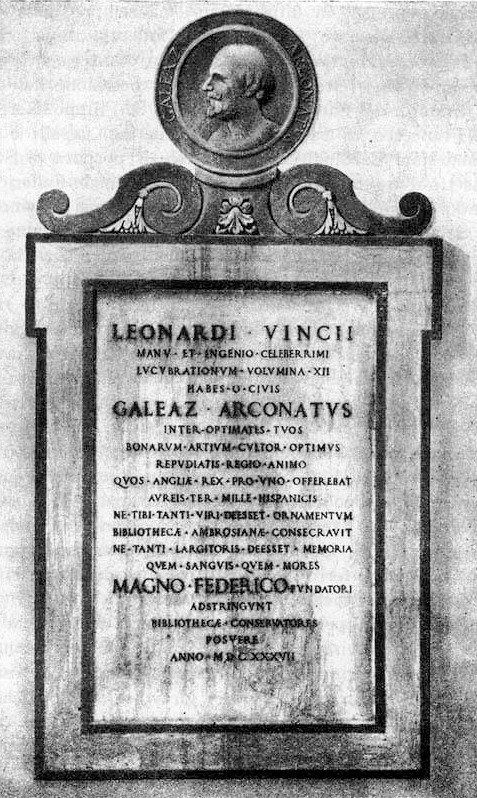 Lapide alla Biblioteca Ambrosiana in memoria di Galeazzo Arconati